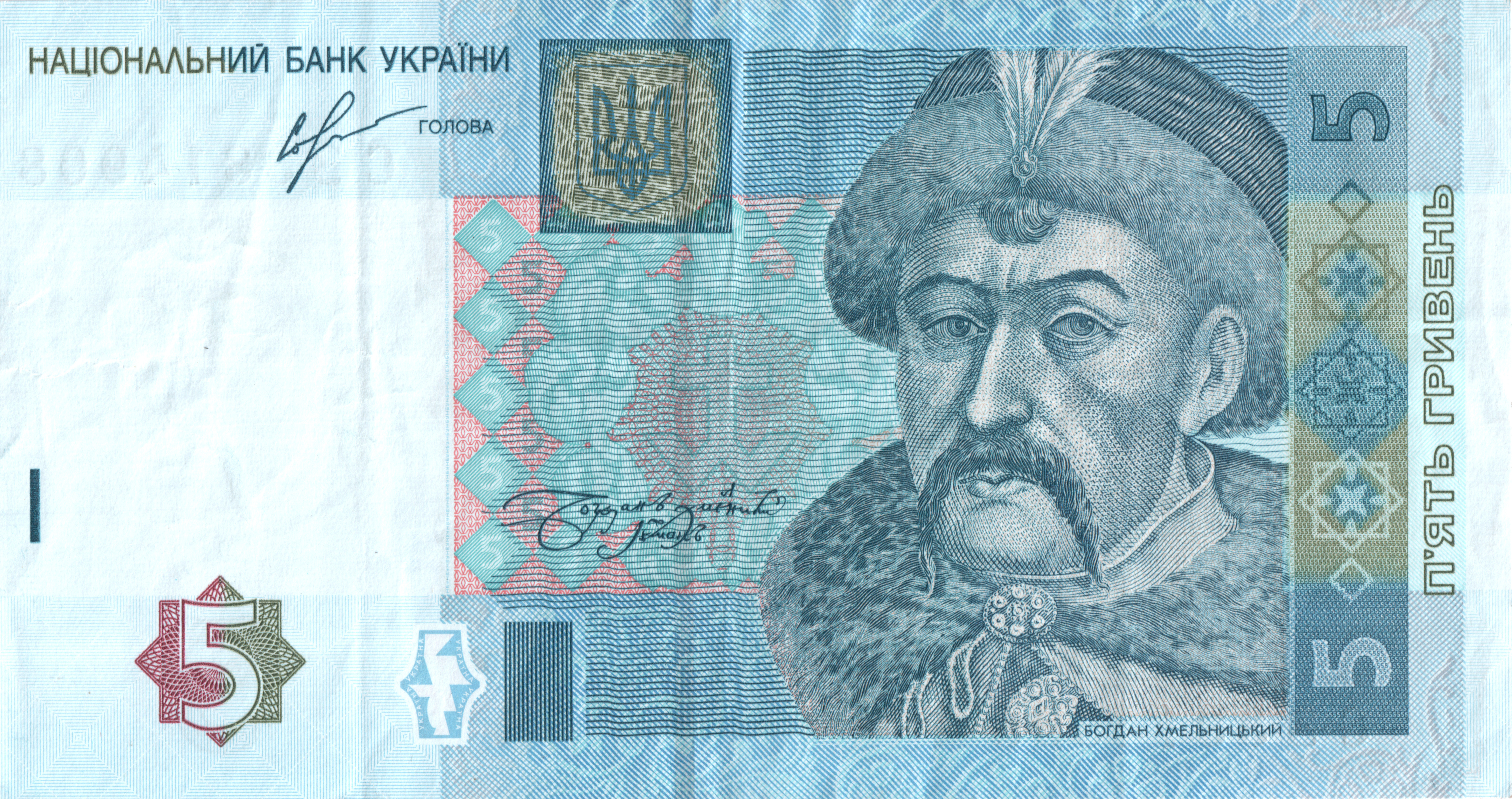 5 гривен 2013 року аверс